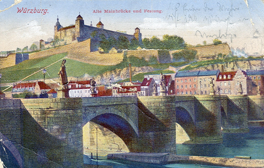 Postkarte, datiert 17.8.1920. Beschriftung: " Würzburg - Alte Mainbrücke und Festung".